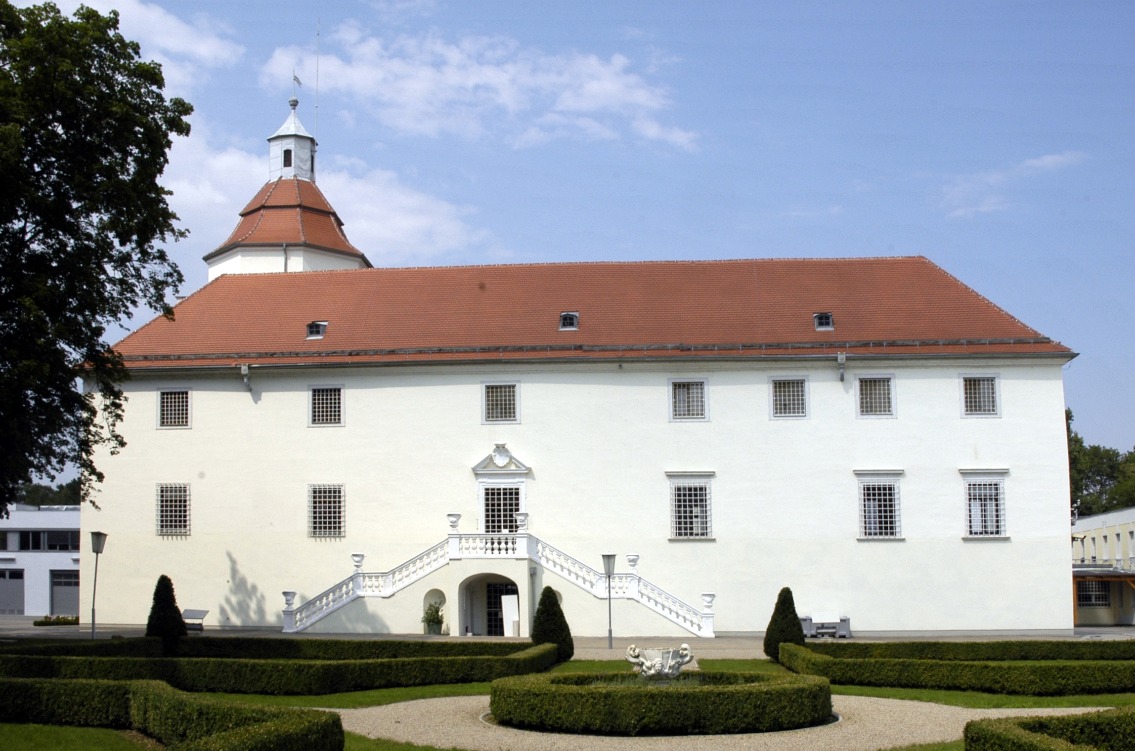 ehemaliges Schloss Sonnberg, Justizanstalt, Südfassade vom Barockgarten aus gesehen